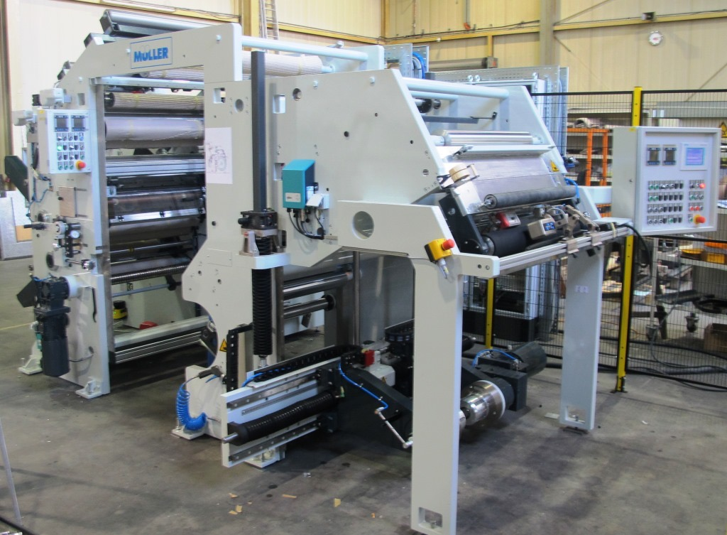 vertikal heb- und senk- bare achslose Abrollung